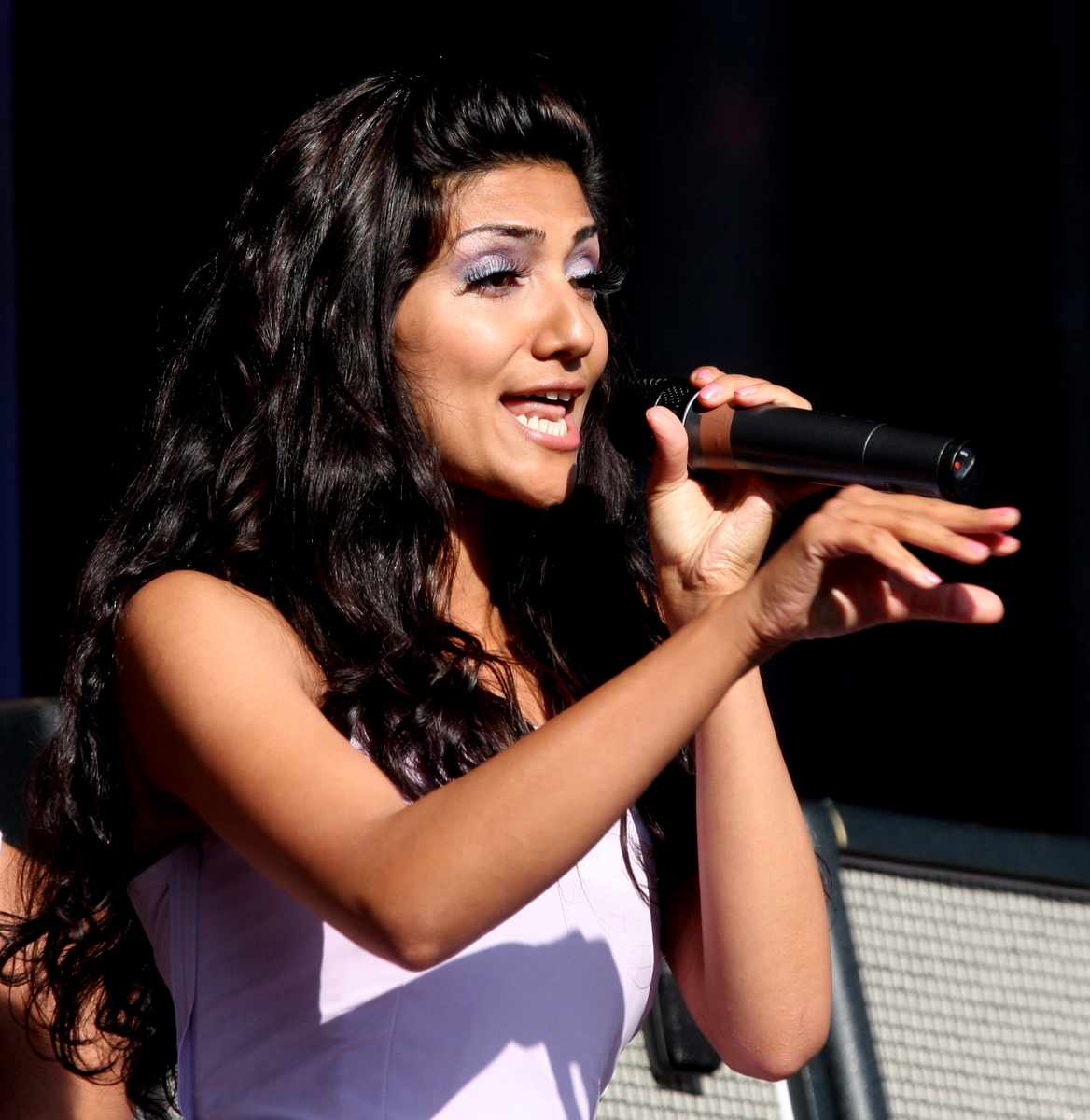 Samsaya